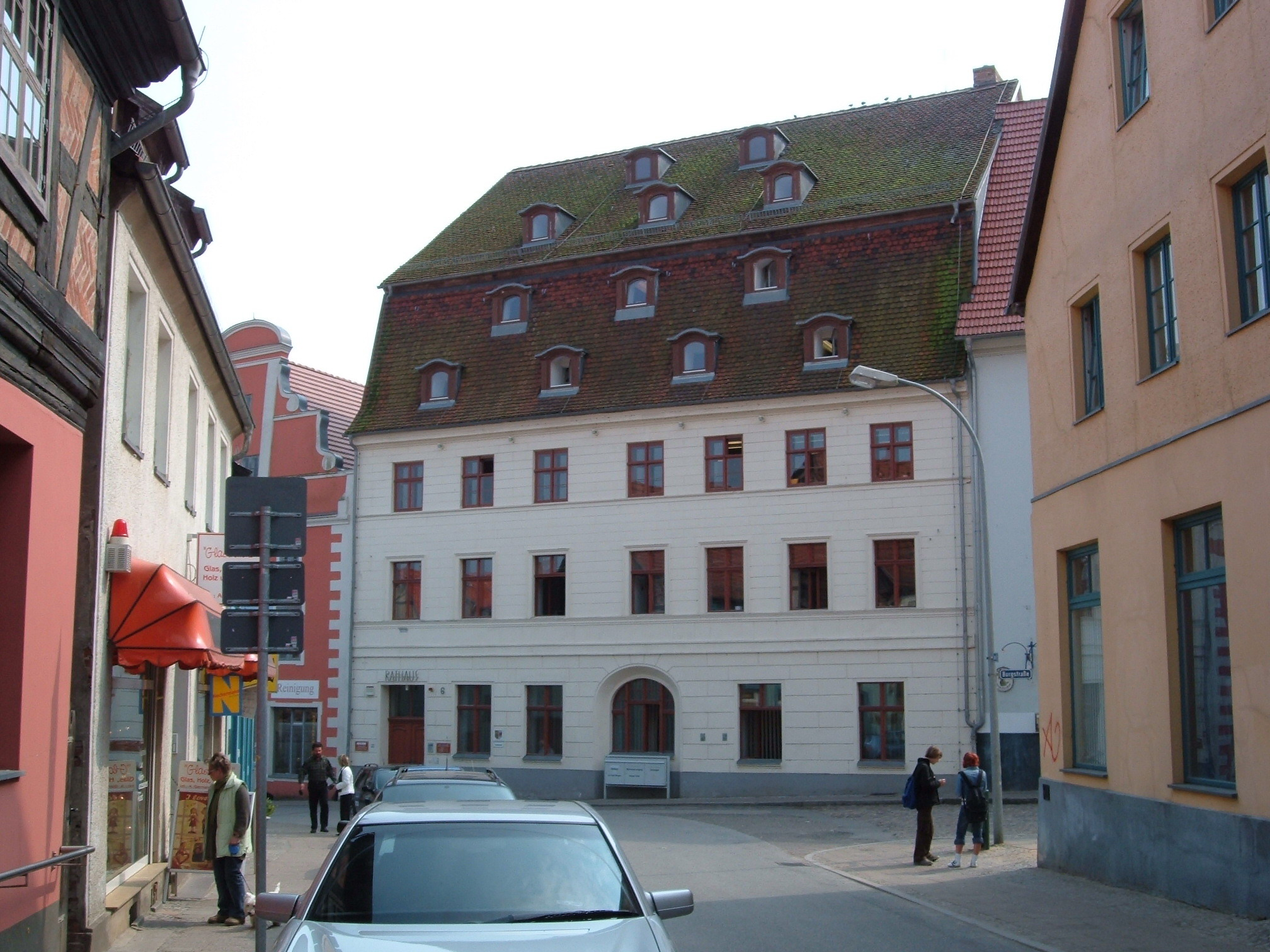 Technisches Rathaus Wolgast, Burgstraße 6, Ansicht aus der Langen Straße